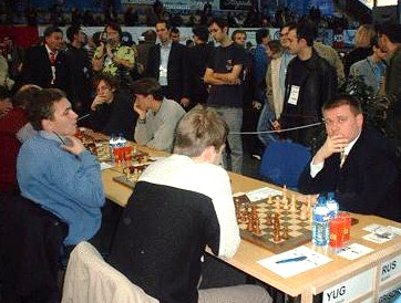 14. Runde der Schacholympiade 2002 in Bled (Jugoslawien): links die jugoslawische und rechts die russische Mannschaft bei ihrem Kampf im Turniersaal.